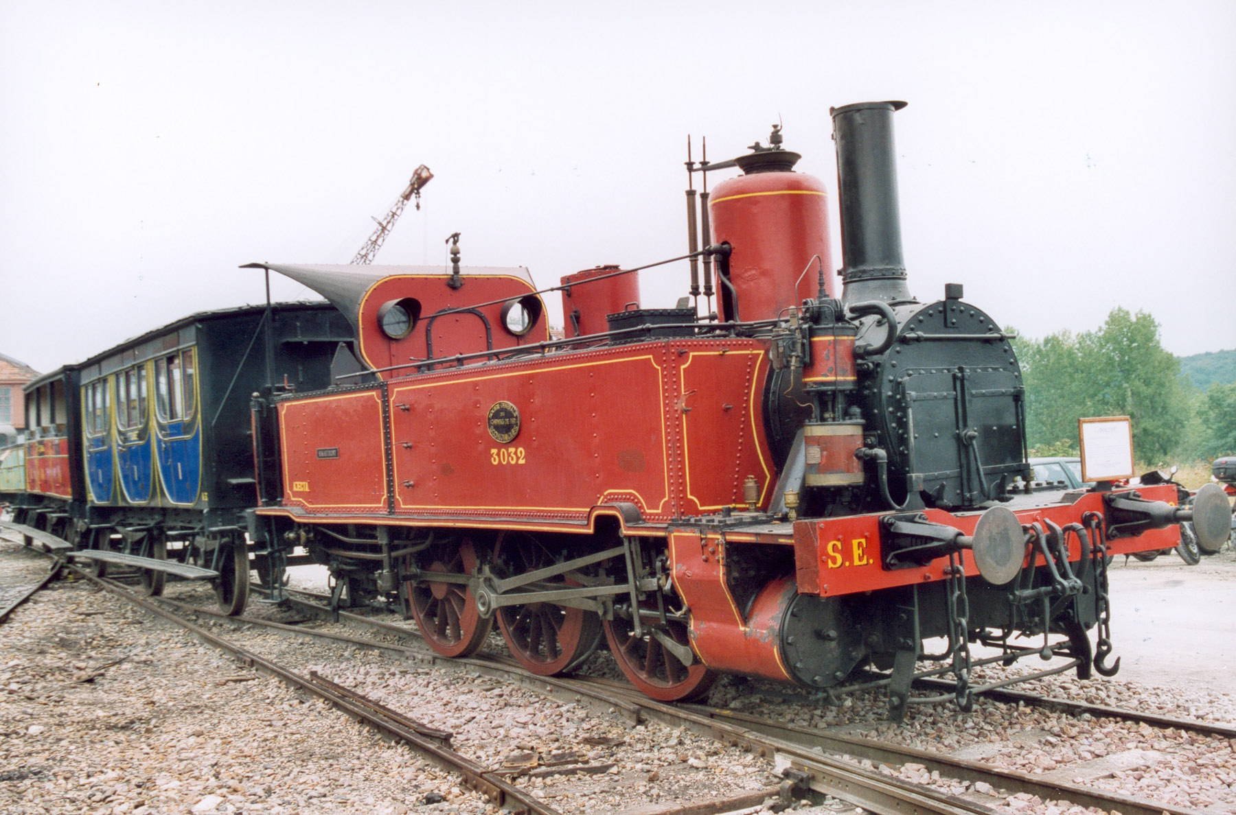 Longueville l'ancien dépot de locomotives AJECTA Auteur : GIRAUD Patrick